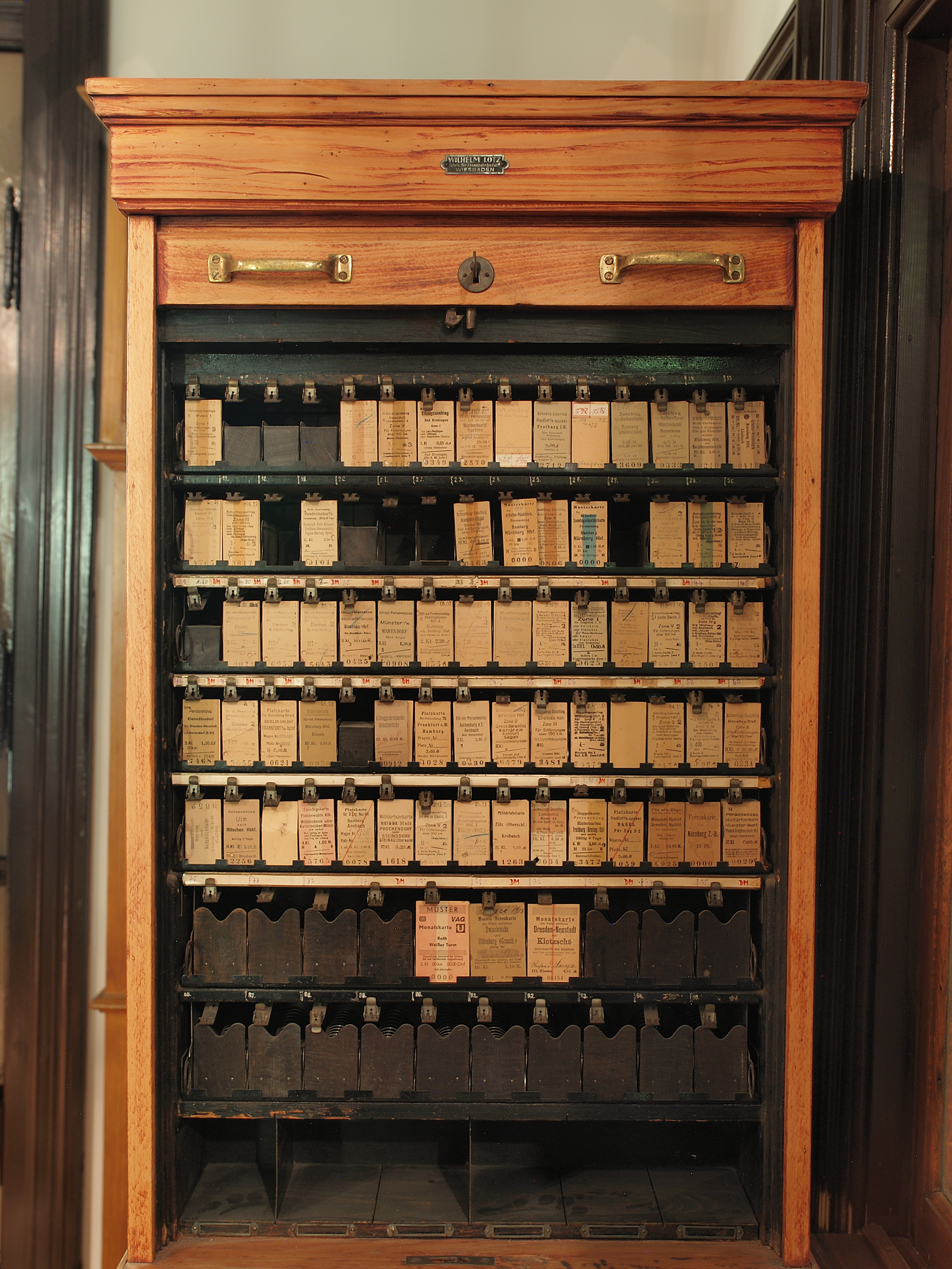 Verkehrsmuseum Nürnberg, Schrank mit historischen Fahrkarten